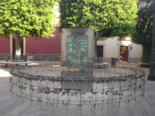 Candados alrededor de una imagen de San Valentín en la plaza de Campoamor, Almería